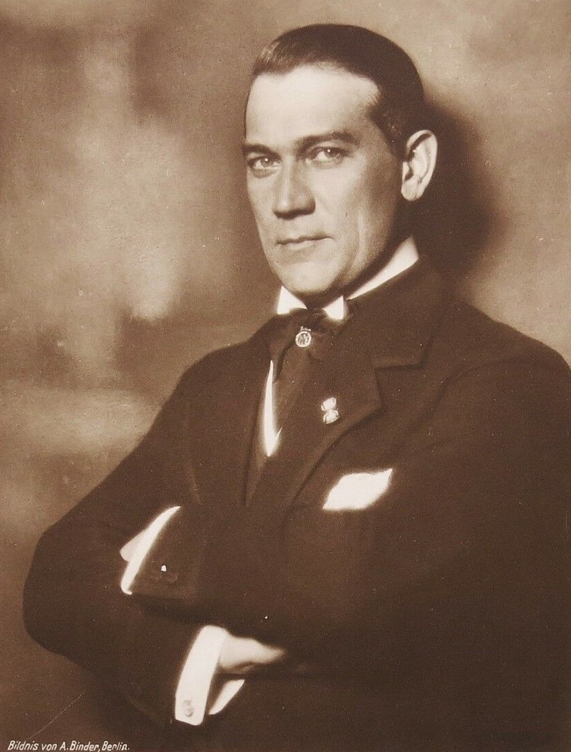 Alwin Neuß, by Alexander Binder. Photochemie-Karte Nr. K 1507